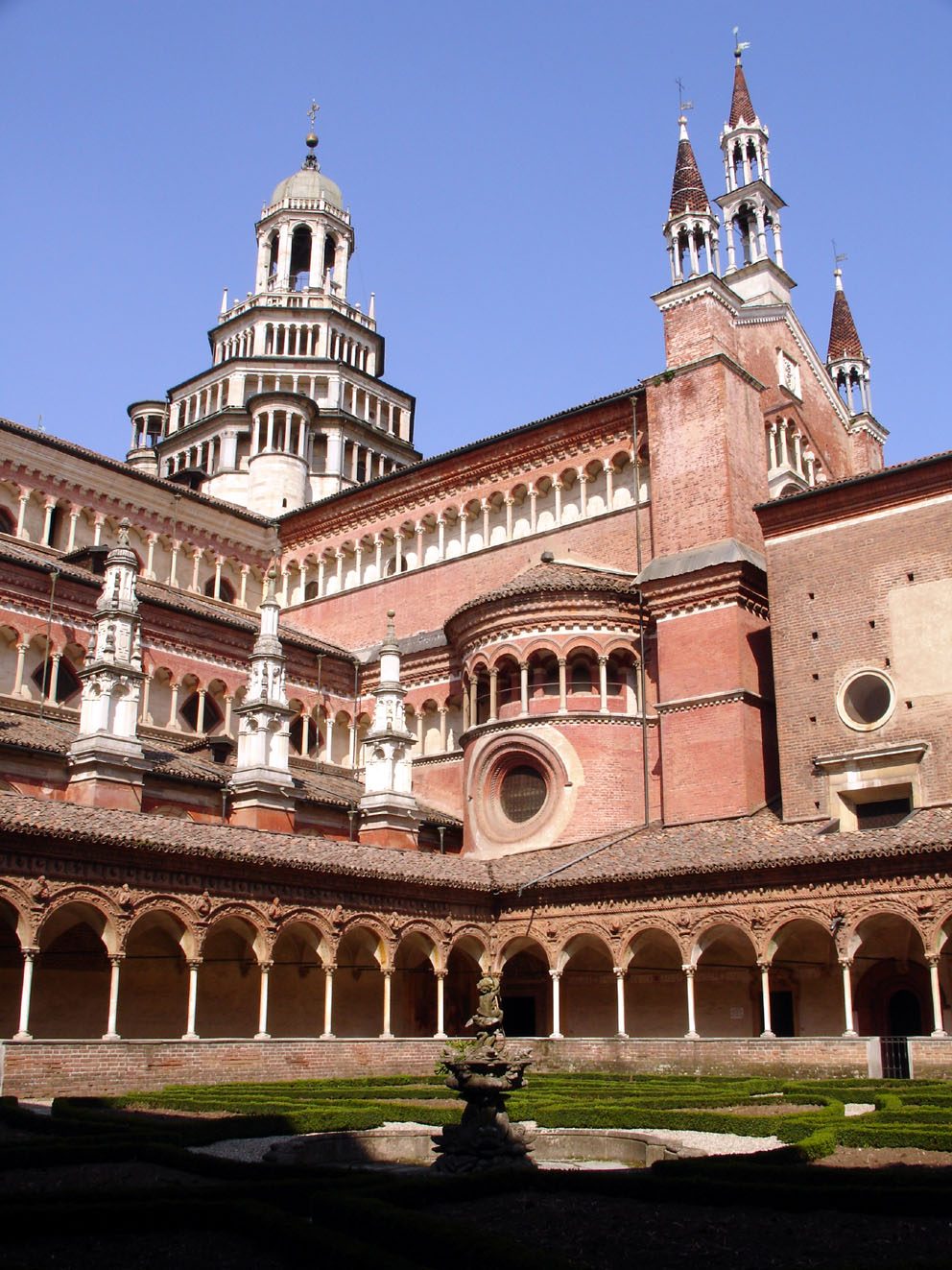 Certosa di Pavia - Chiostro piccolo